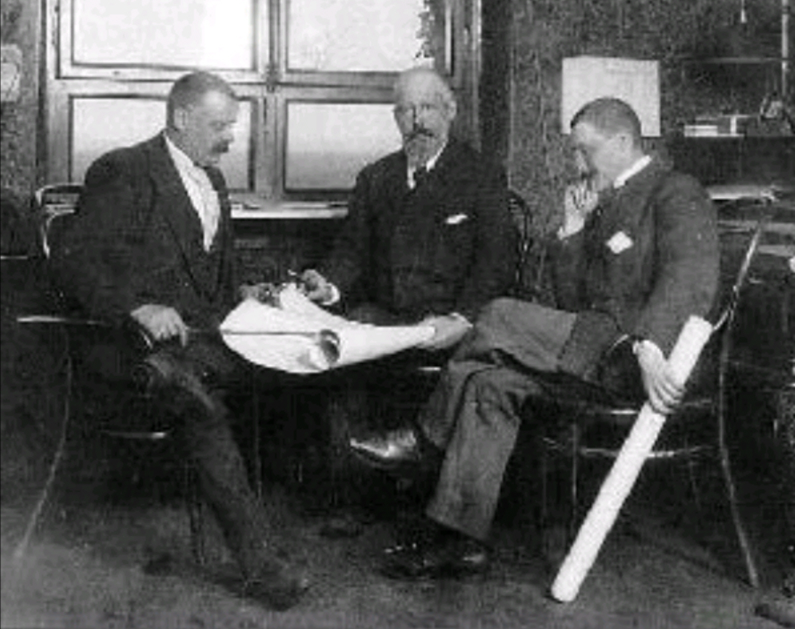 vlnr. Meinhard Hoffmann (* 18. November 1853 in Wiesbaden; † 18. Januar 1936 in Deixlfurt) Leo Gans (* 4. August 1843 in Frankfurt am Main; † 14. September 1935 ebenda) Arthur von Weinberg (* 11. August 1860 in Frankfurt am Main; † 20. März 1943 im Theresienstadt)